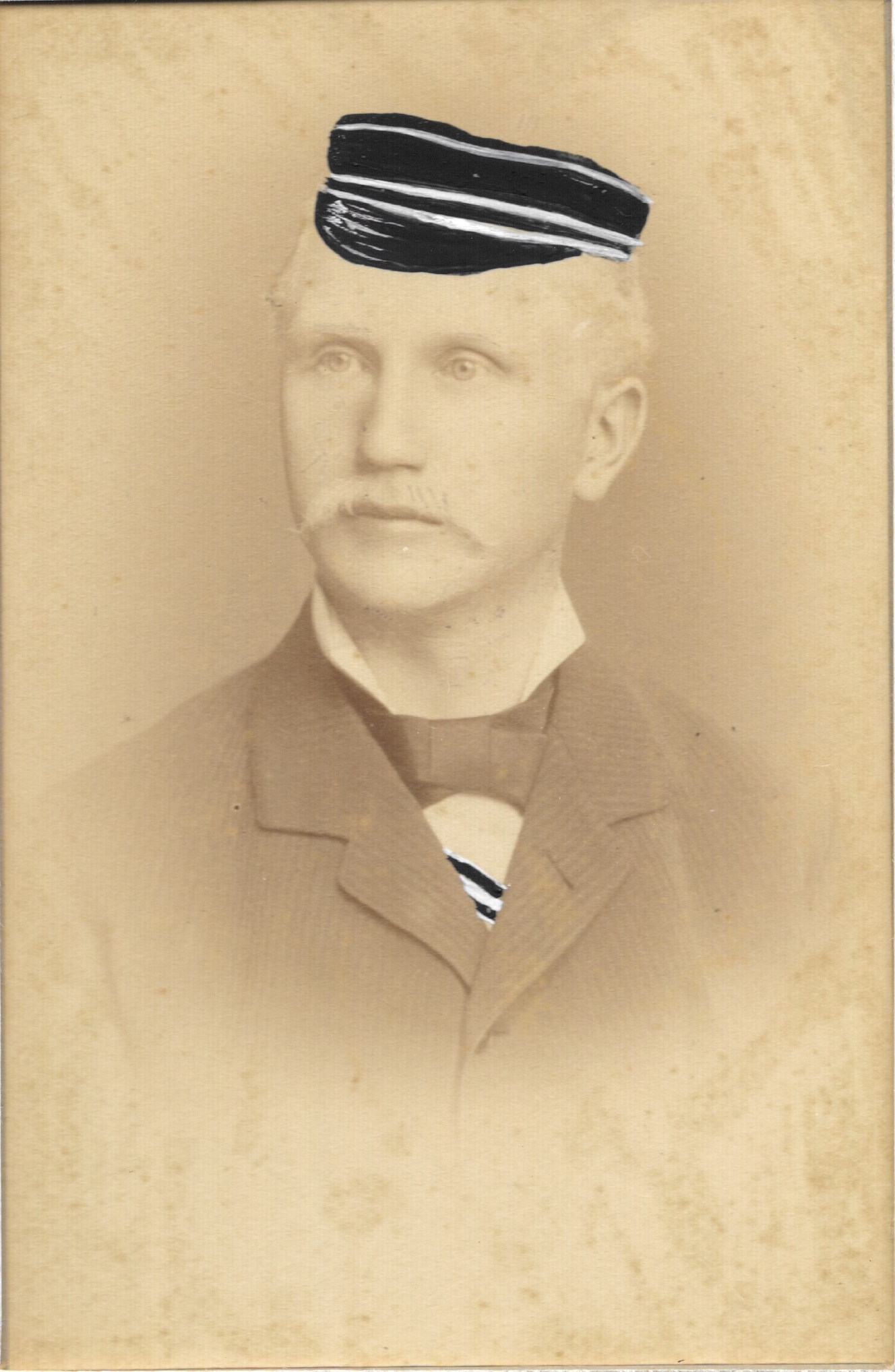 Otto Richter Porträt des Corps Teutonia-Hercynia